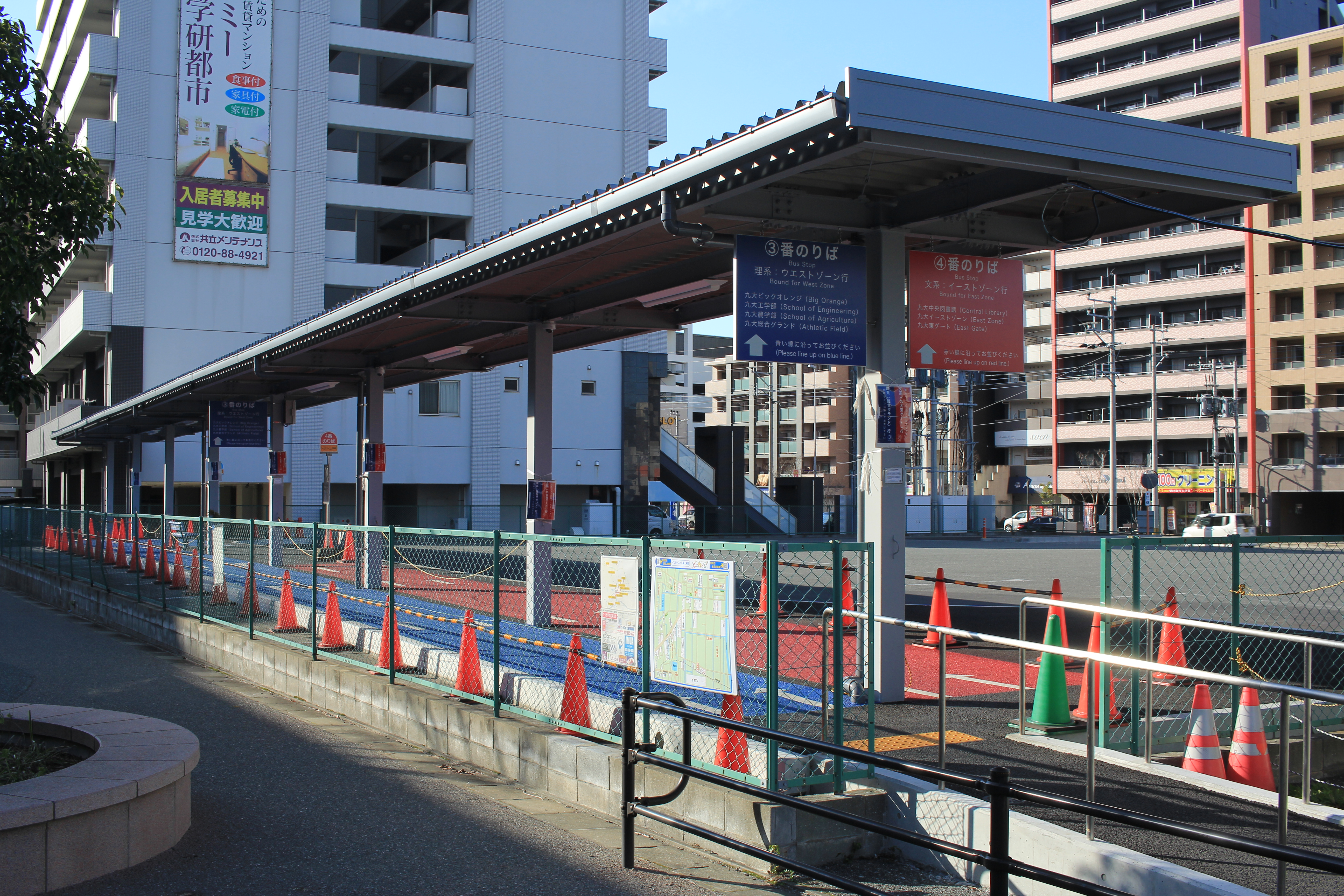 九大学研都市駅バス停（昭和自動車私有地） Canon EOS 60D